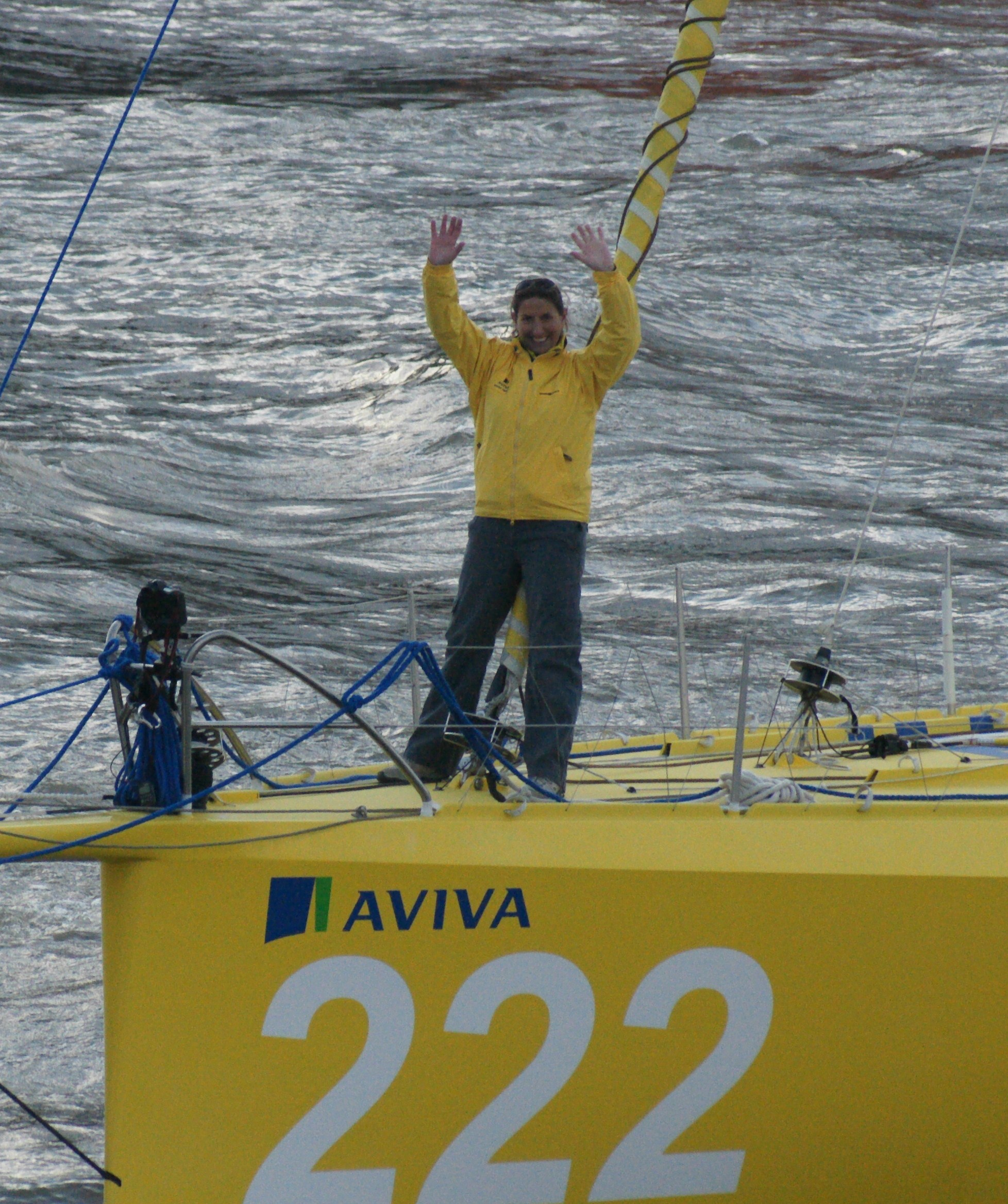 Dee Caffari celebrates her Vendée Globe 2008-2009 in London.